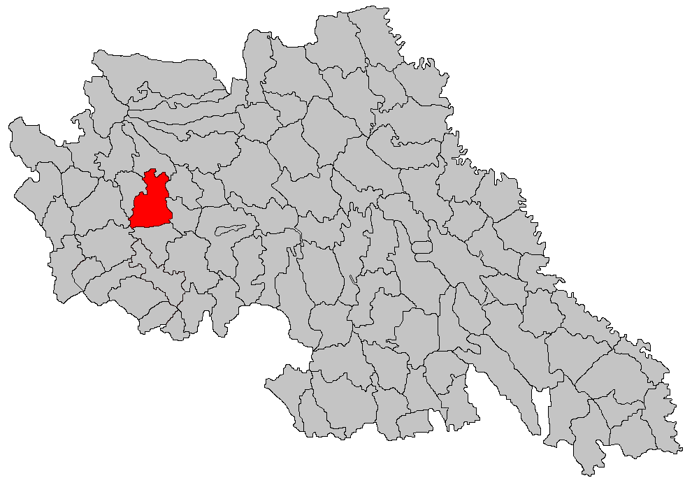 Categorie:Hărţi ale judeţului Iaşi